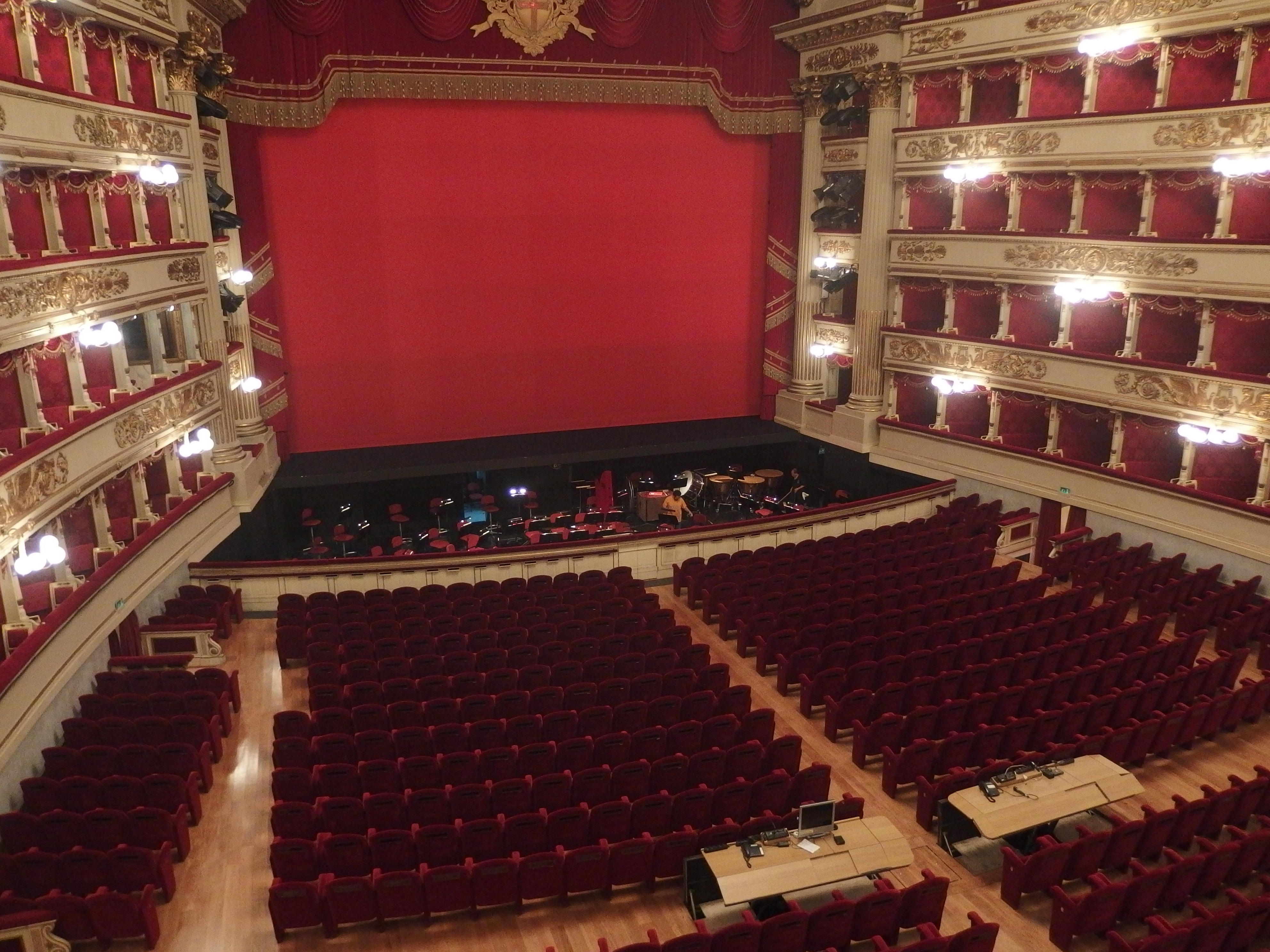 Milano, Teatro alla Scala